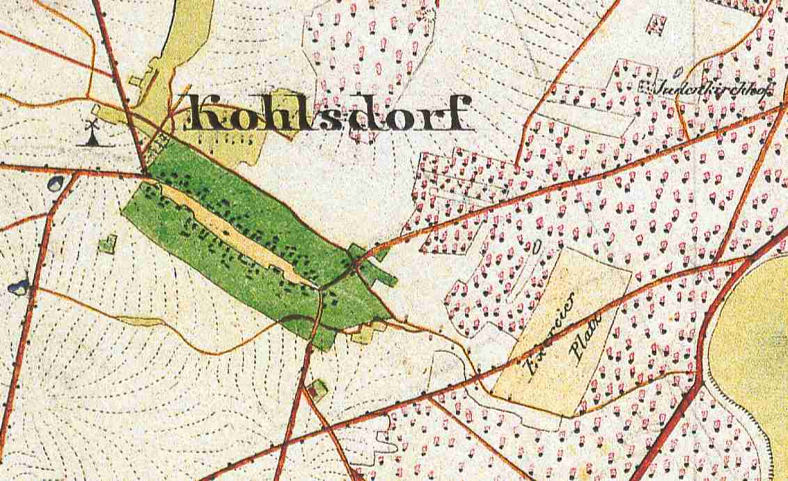 Kohlsdorf, Ortsteil der Stadt Beeskow, Lkr. Oder-Spree, Brandenburg, Deutschland, Ausschnitt aus dem Urmesstischblatt 3851 Beeskow von 1846